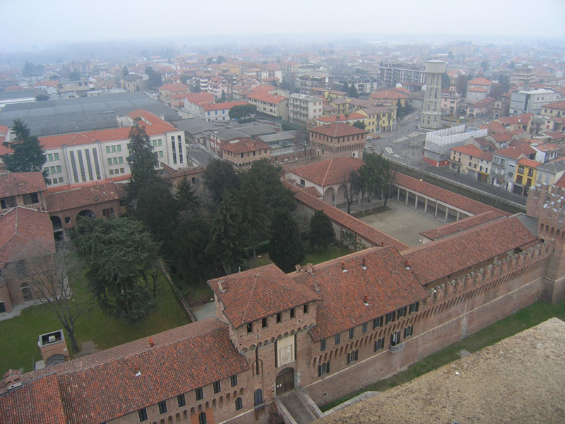 Vista di Galliate (provincia di Novara) parte nord-est dal campanile. Sorgente: mia fotocamera digitale.